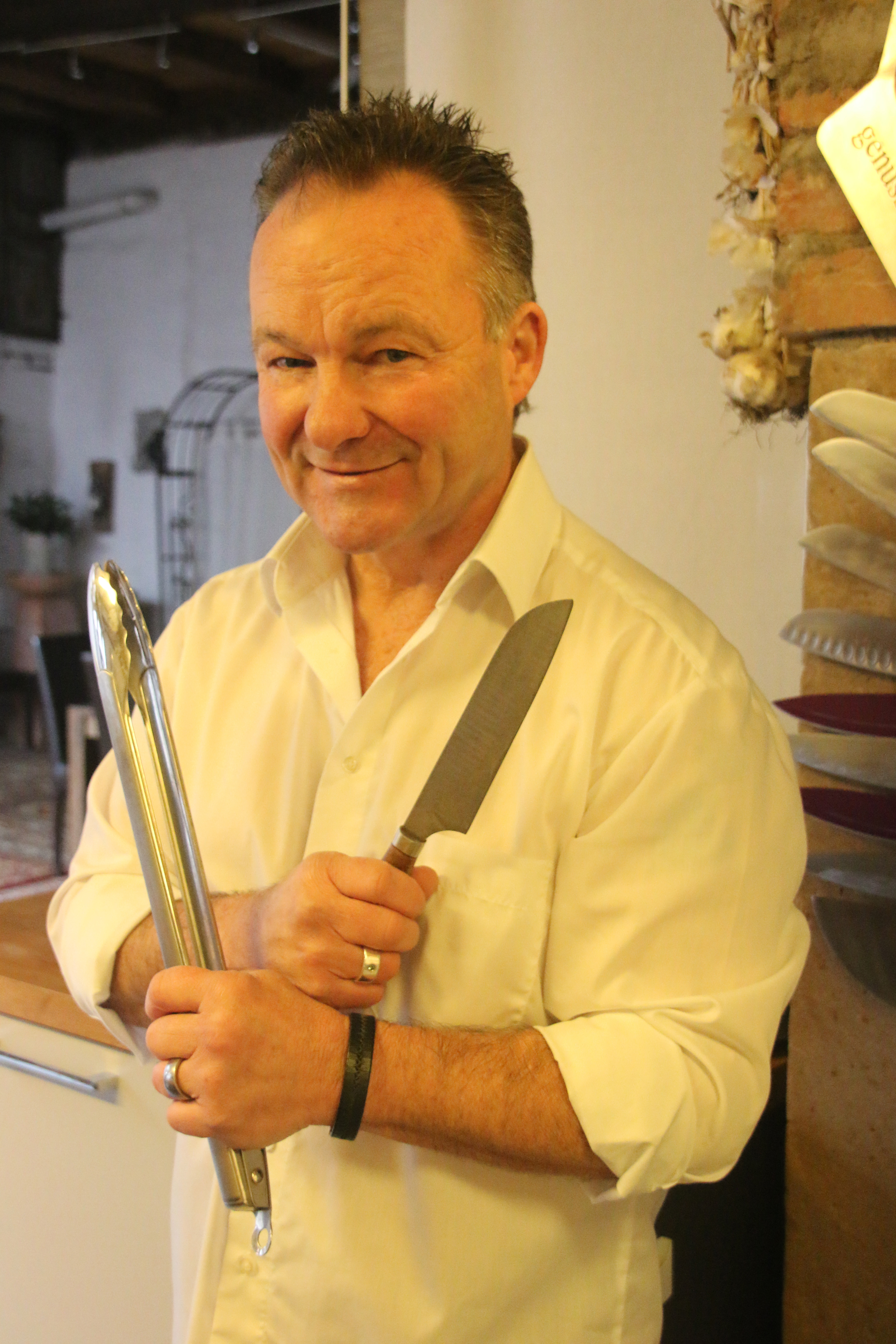 Autorenfoto